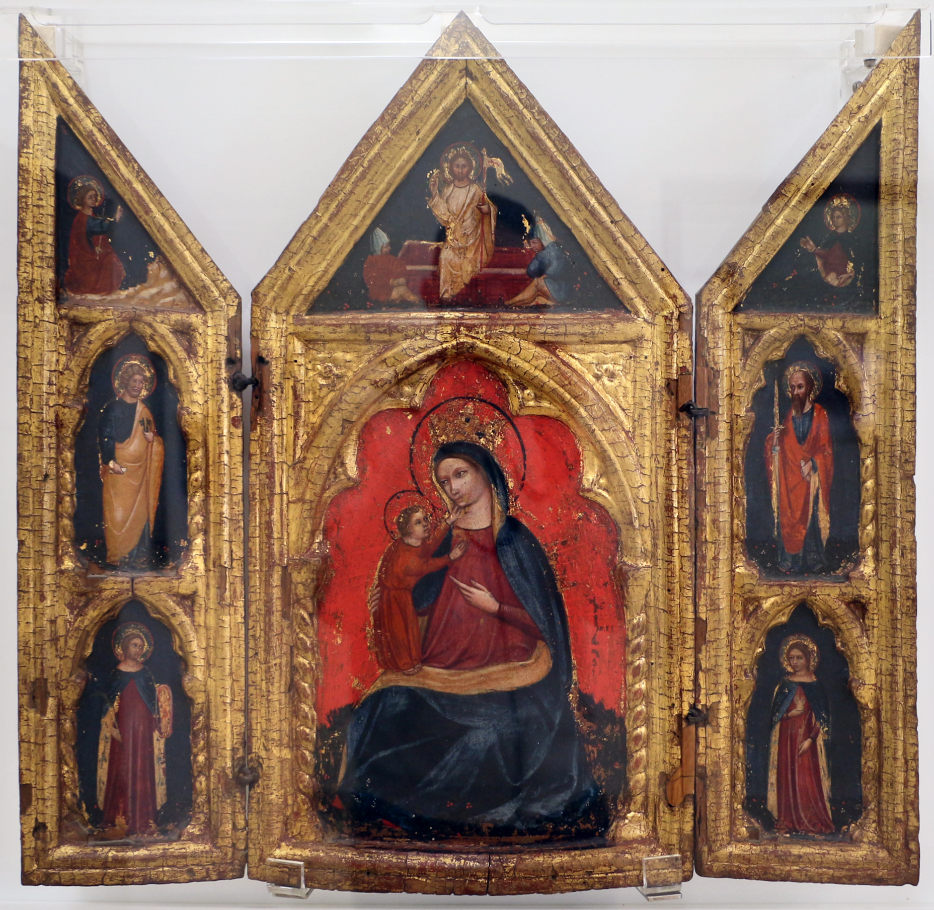 altarolo con la madonna dell'umiltà, cristo risorto, annunciazione e santi